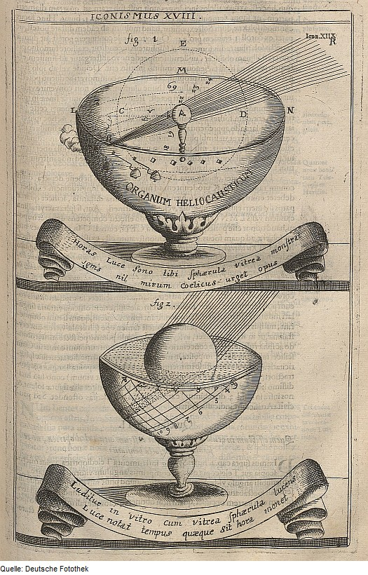 Original image description from the Deutsche Fotothek Optik & Dioptrik & Licht & Brechung & Sonne